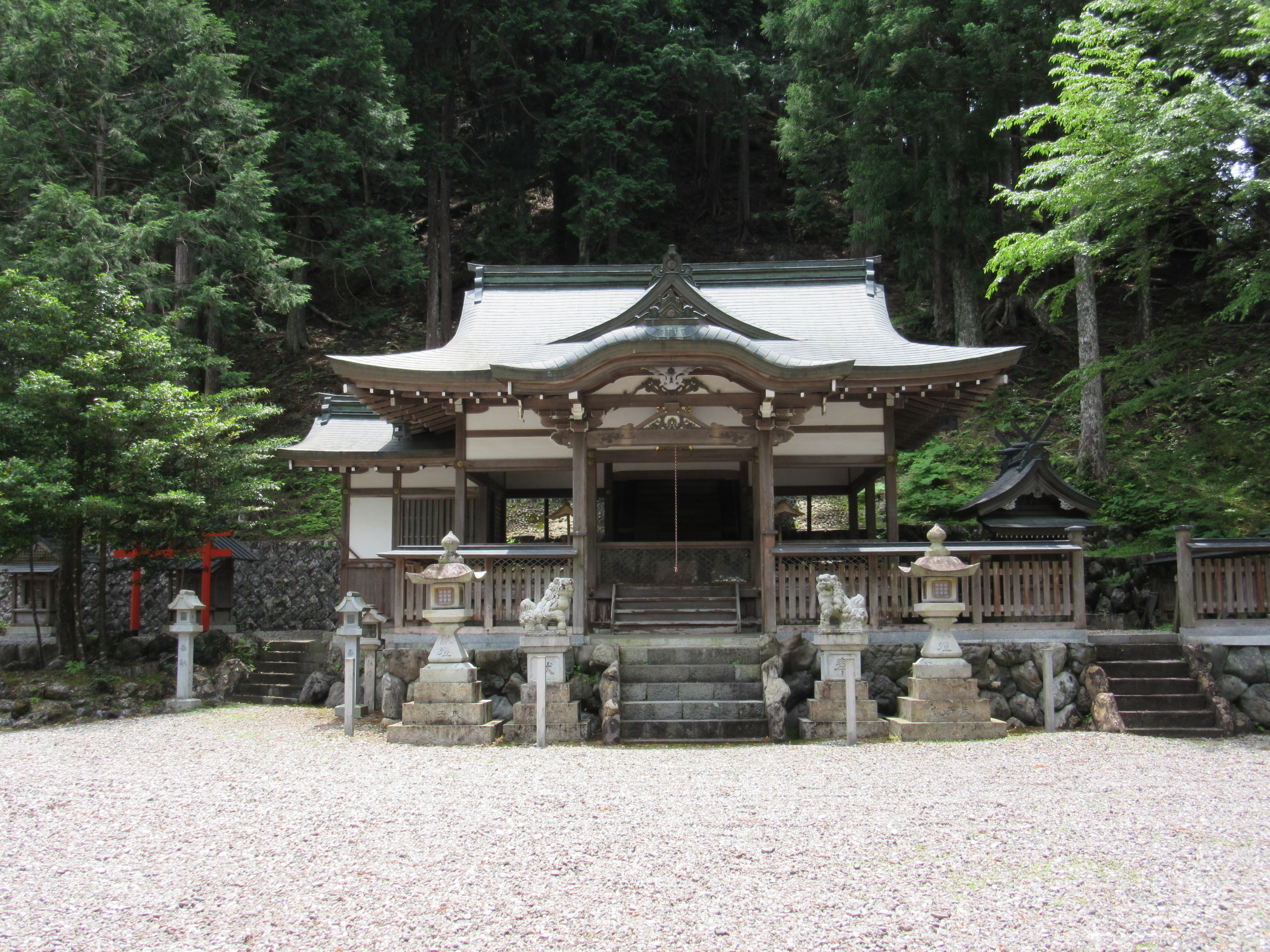 上北山村河合・八坂神社